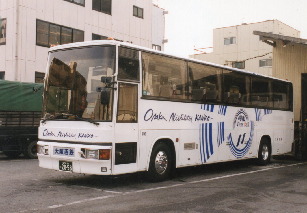 営業所にて、許可を得て撮影